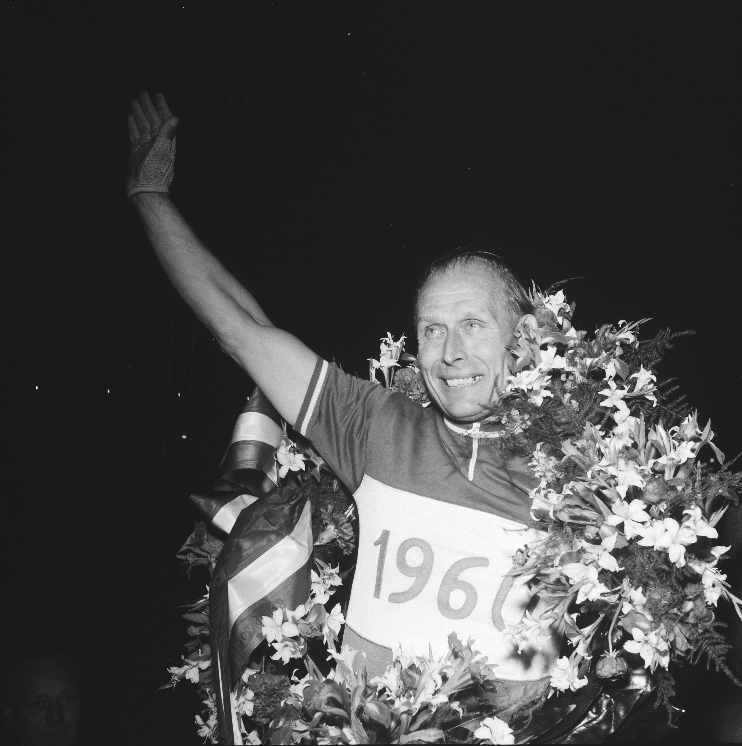 Collectie / Archief : Fotocollectie Anefo Reportage / Serie : [ onbekend ] Beschrijving : Jan Derksen Nederlandse sprintkampioen voor de elfde maal. Jan Derksen met zijn krans Datum : 2 juni 1960 Trefwoorden : sport, wielrennen Persoonsnaam : Derksen, Jan Fotograaf : Pot, Harry / Anefo Auteursrechthebbende : Nationaal Archief Materiaalsoort : Negatief (zwart/wit) Nummer archiefinventaris : bekijk toegang 2.24.01.03 Bestanddeelnummer : 911-3077